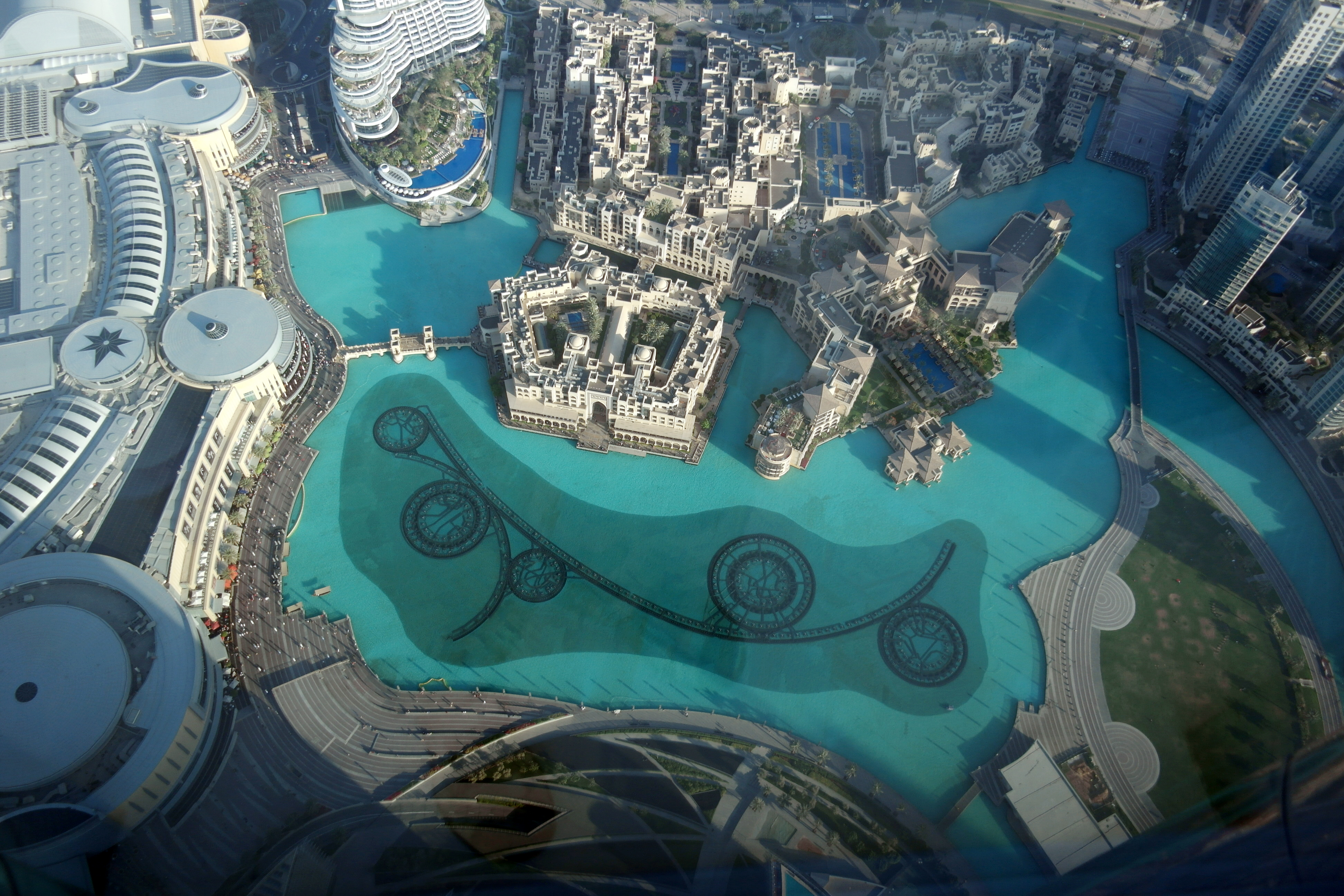 Burj Khalifa lake, Burj Park - Dubai - United Arab Emirates